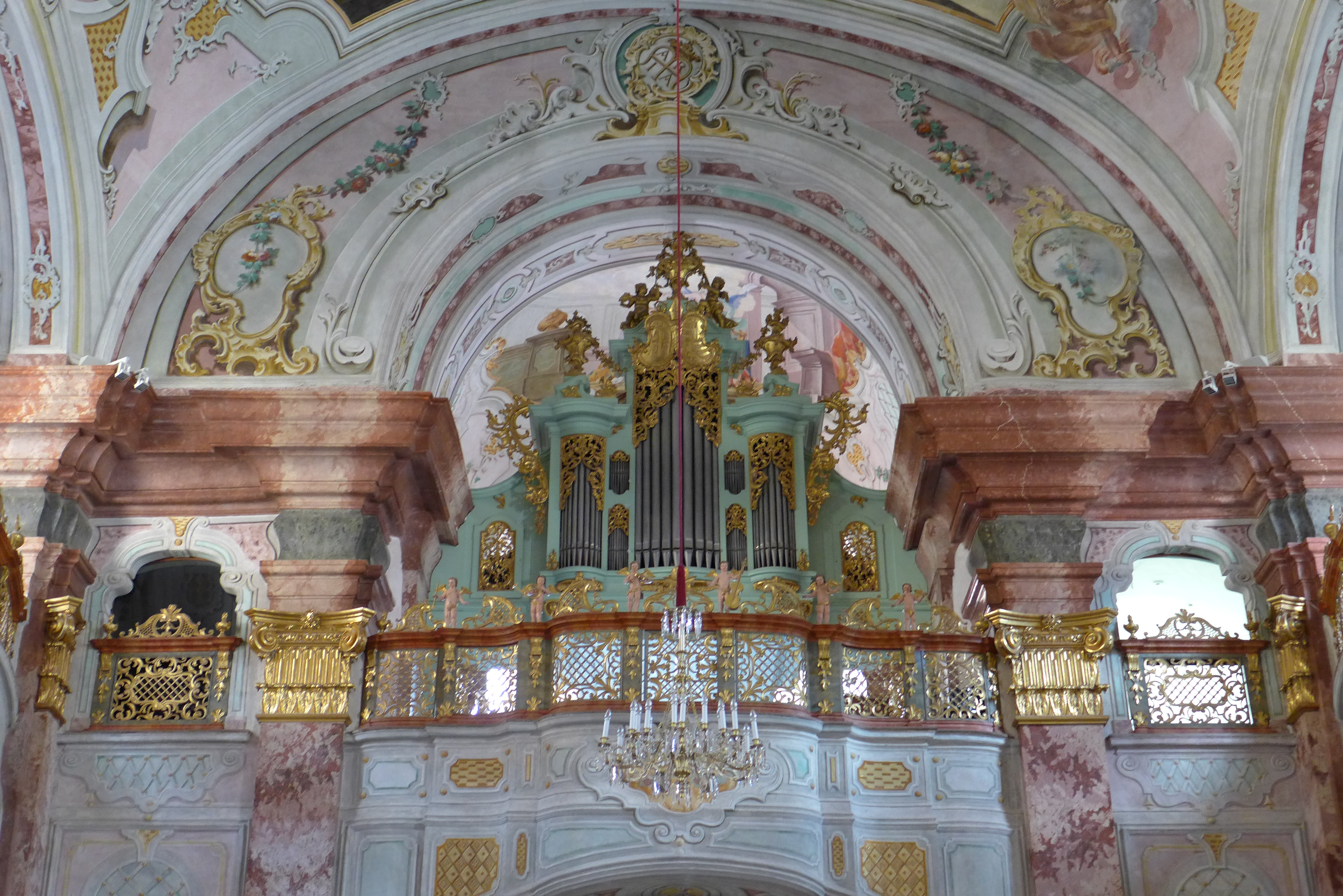 Stiftskirche Rein - Orgel